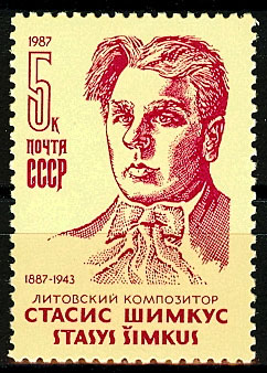 Почтовая марка